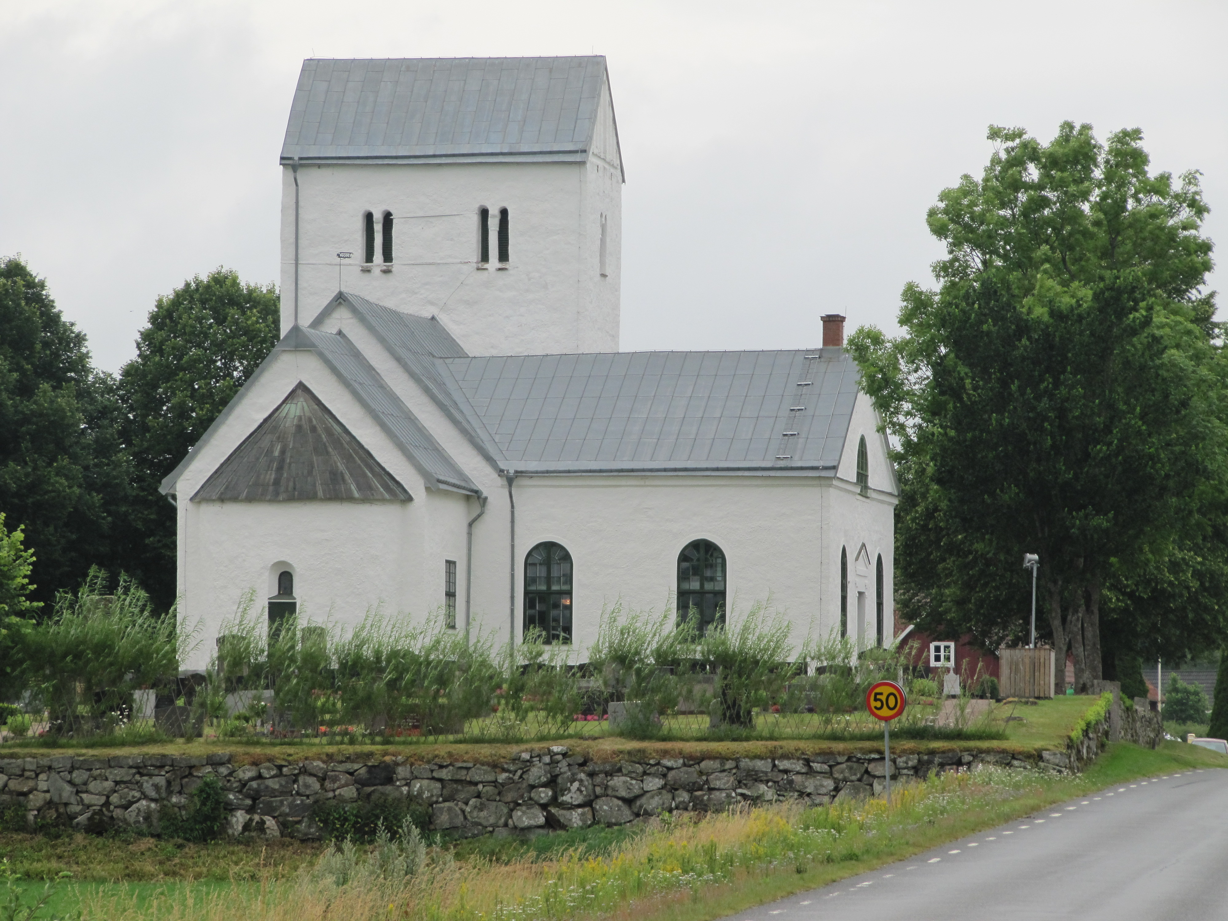 Farstorps kyrka